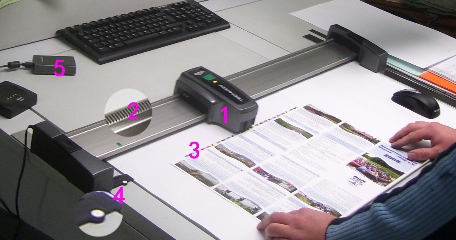 Elektromotorisch angetriebenes Spektraldensitometer. Das Gehäuse (1) mit dem Spektralmesskopf läuft auf einer Zahnschiene (2) und scannt die Druckkontrollleiste (3), in der Hinbewegung im Farbmetrik-Modus ohne Polfilter, in der Rückbewegung im Densitometrie-Modus mit Polfilter. Die Gerätestation besitzt ein Weißnormal (4), auf das sich das Gerät bei Messbeginn automatisch für den Farbmetrik-Modus kalibriert. Über eine Bluetooth-Funkschnittstelle werden die Messwerte an den PC mit der Analysesoftware übhertragen.